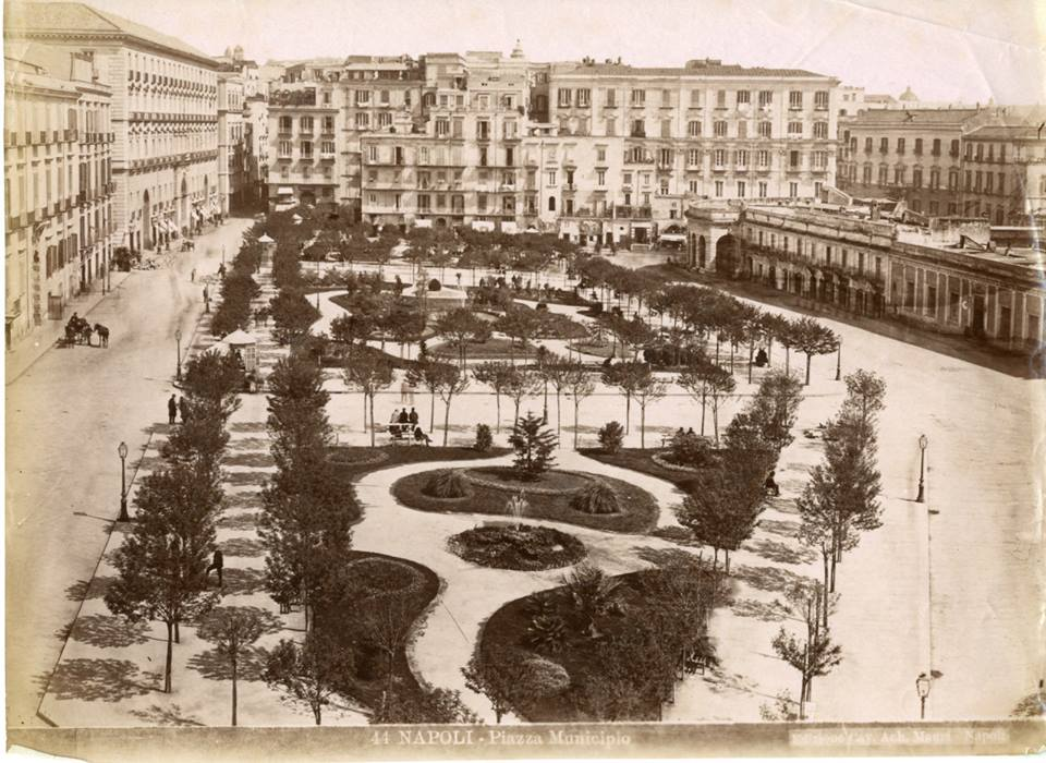 Achille Mauri - "Napoli - Piazza Municipio" con la Gran Guardia (a destra). Catalogo n° 44.